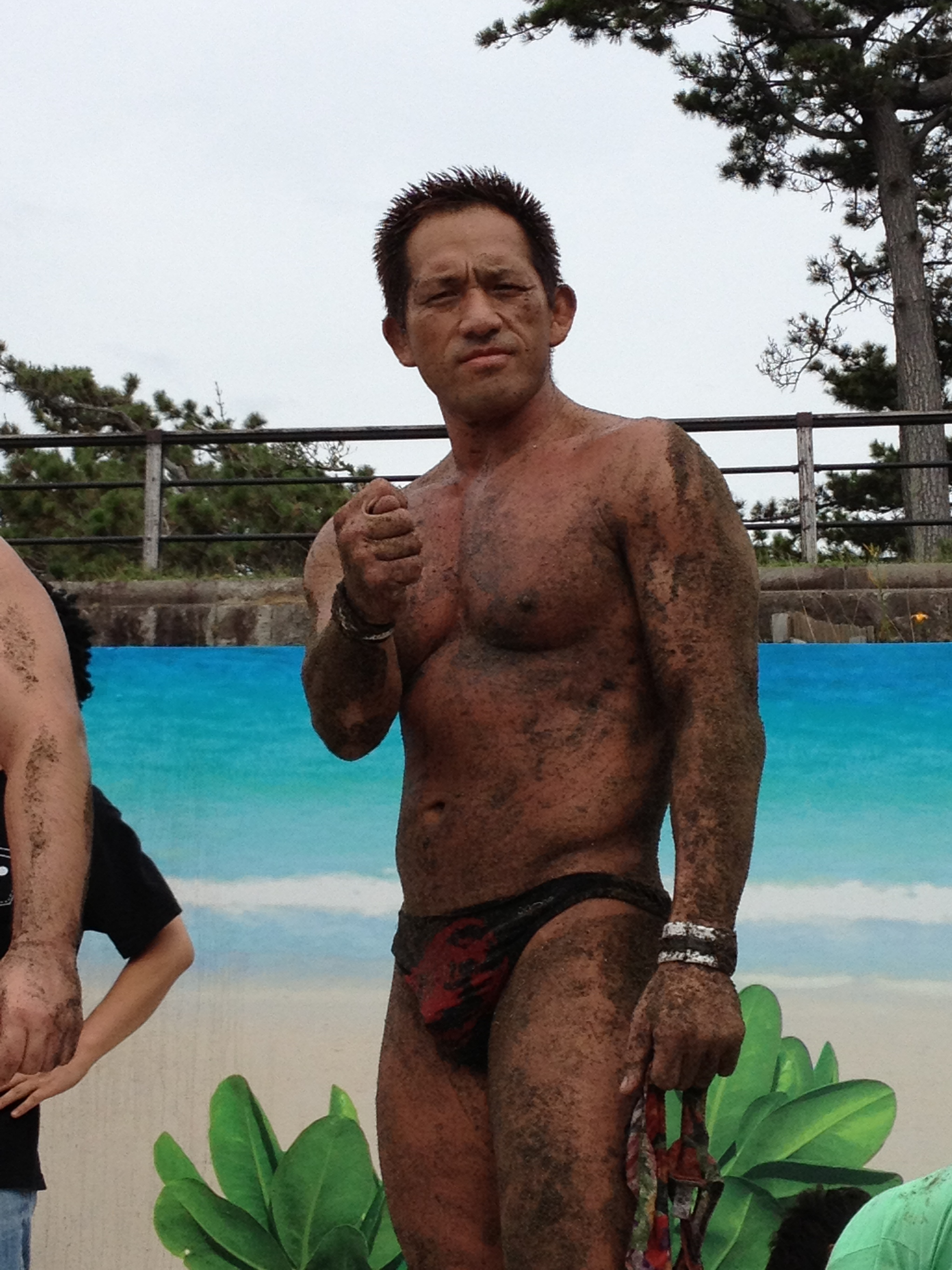 2013年海プロレスにて